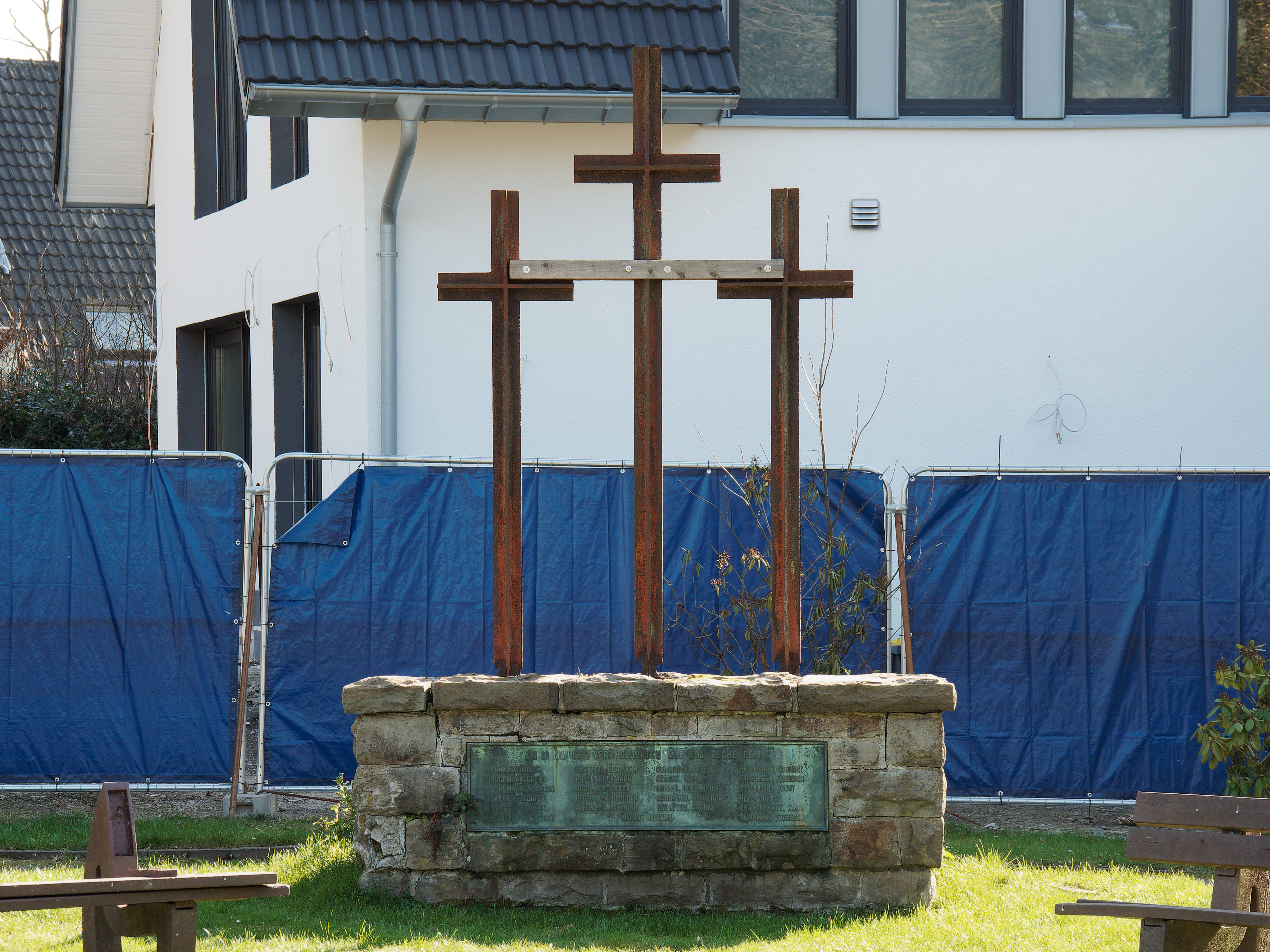 Denkmal für die in der Zeche Pluto in Herne-Wanne-Eickel 1882 verunglückten 23 Bergleute auf dem Friedhof an der Lohofstraße im Stadtteil Eickel.